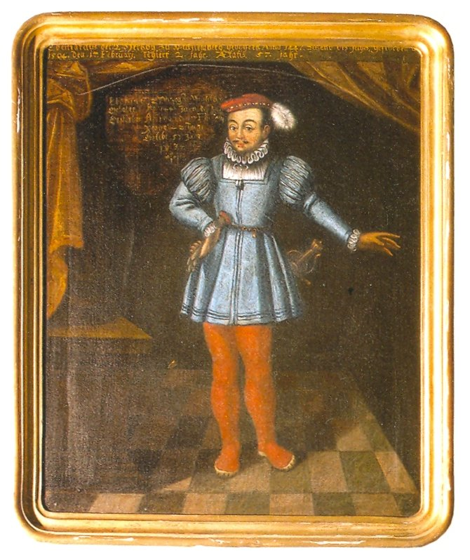 Duke Eberhard II of Württemberg Gemälde, Privatbesitz